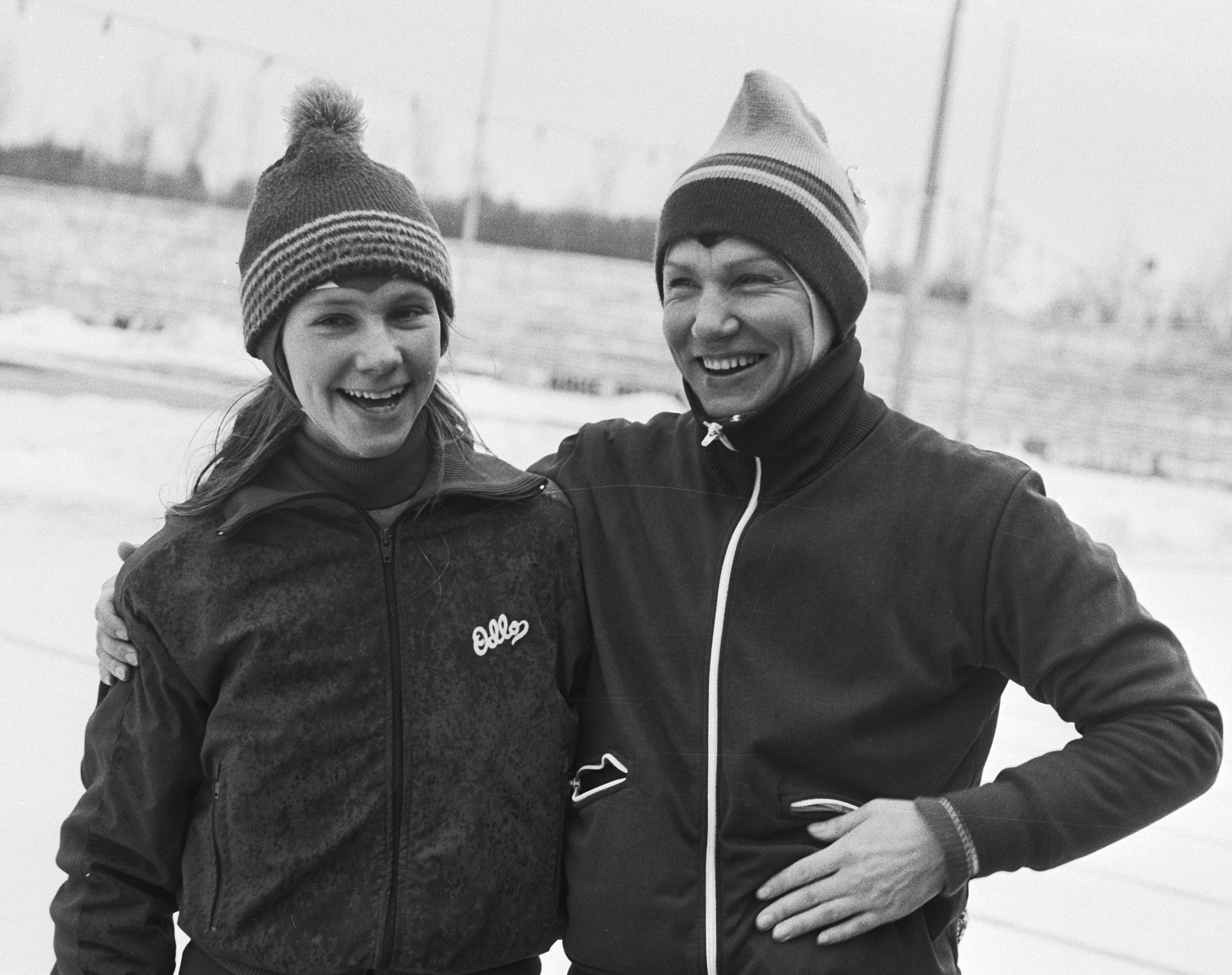 Wereldkampioenschappen schaatsen dames allround in Den Haag; Beth Heiden (left) and Tatyana Averina